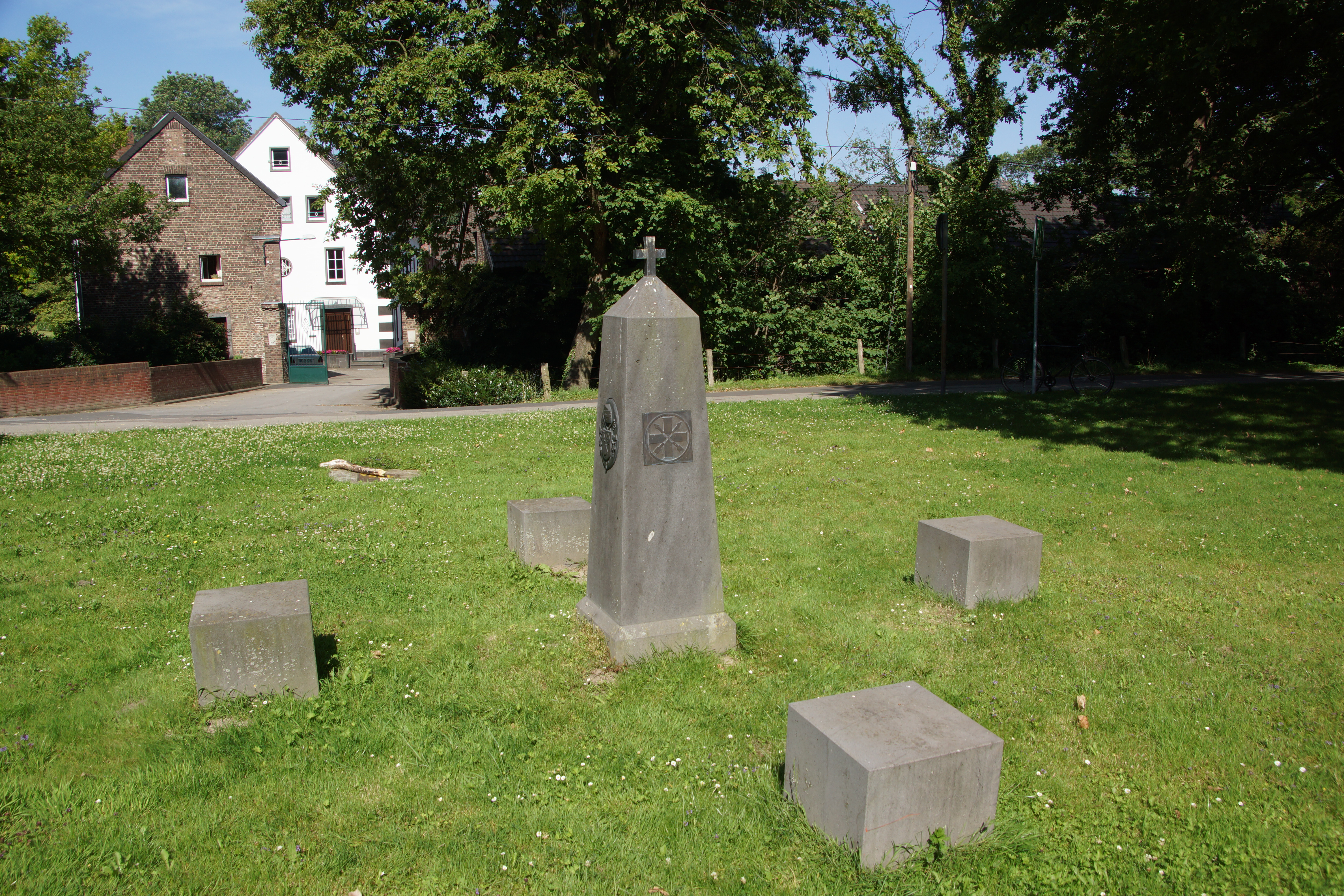 Stele 5 (von sieben) des Adolph‐Kolping‐Pilgerwegs vor dem Stüttgenhof